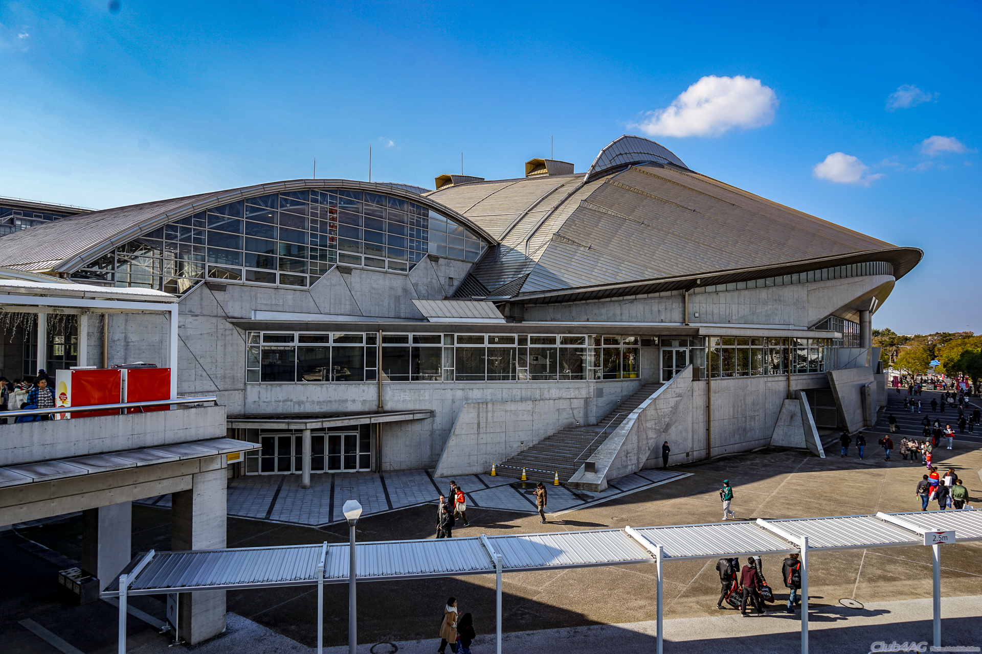 Tokyo Auto Salon 2019